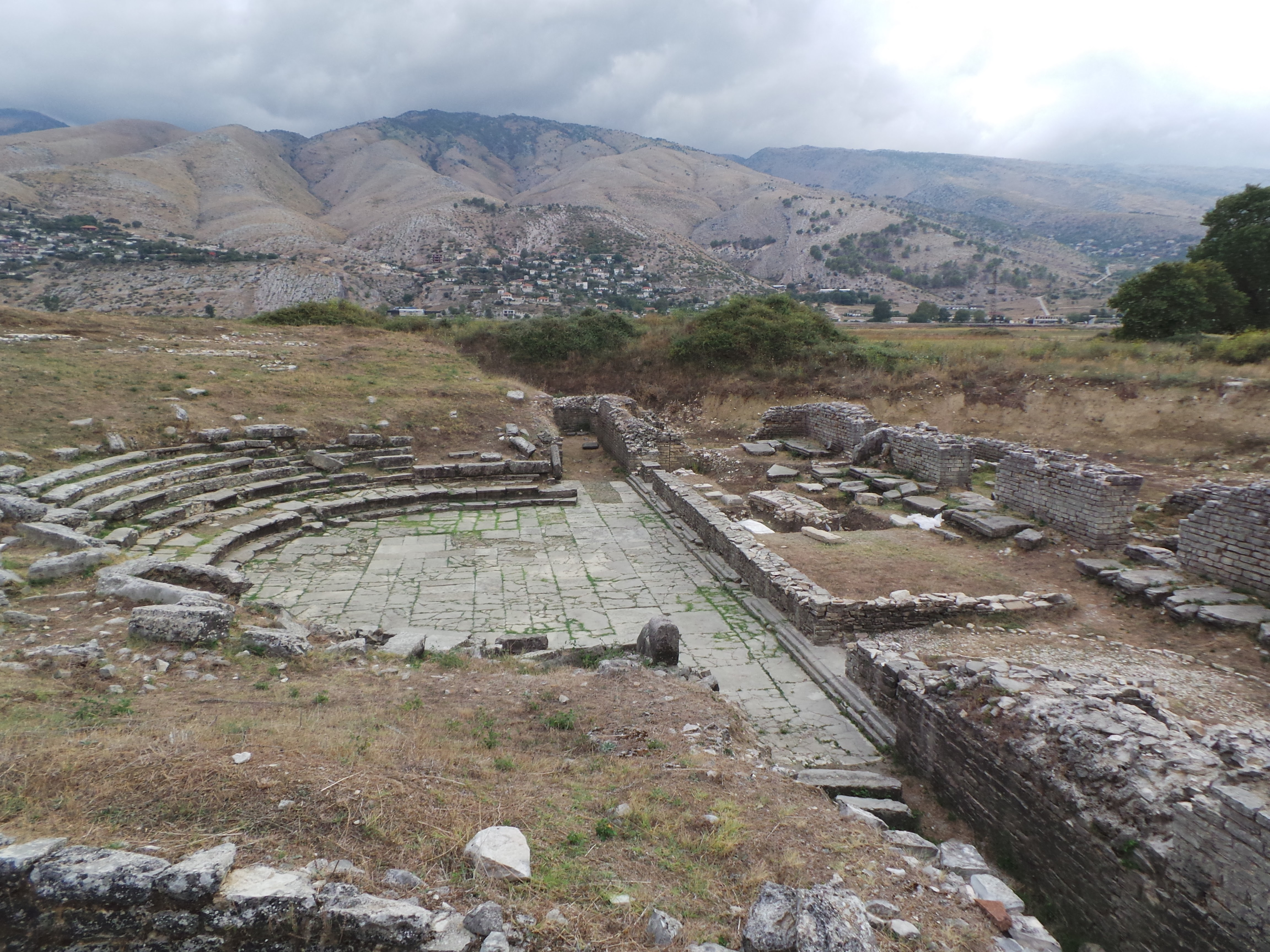 Το αρχαίο θέατρο των Σωφρατίκων και στο βάθος το χωριό.